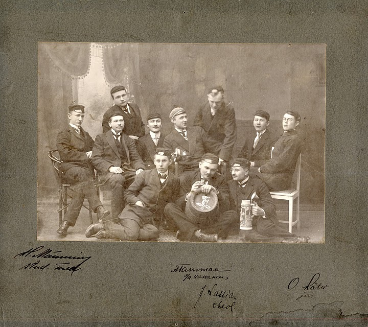 Korp! Sakala rebaste coetus.